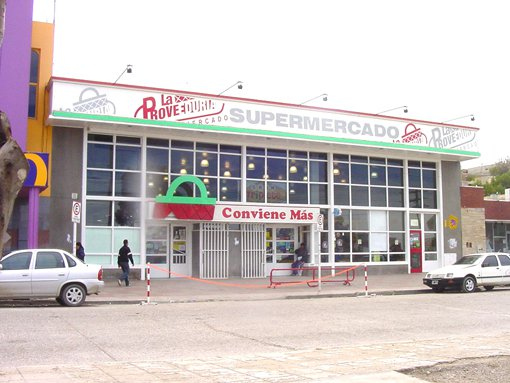 Sucursal de La Proveeduría en avenida Rivadavia